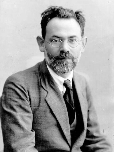 he:יוסף קלוזנר